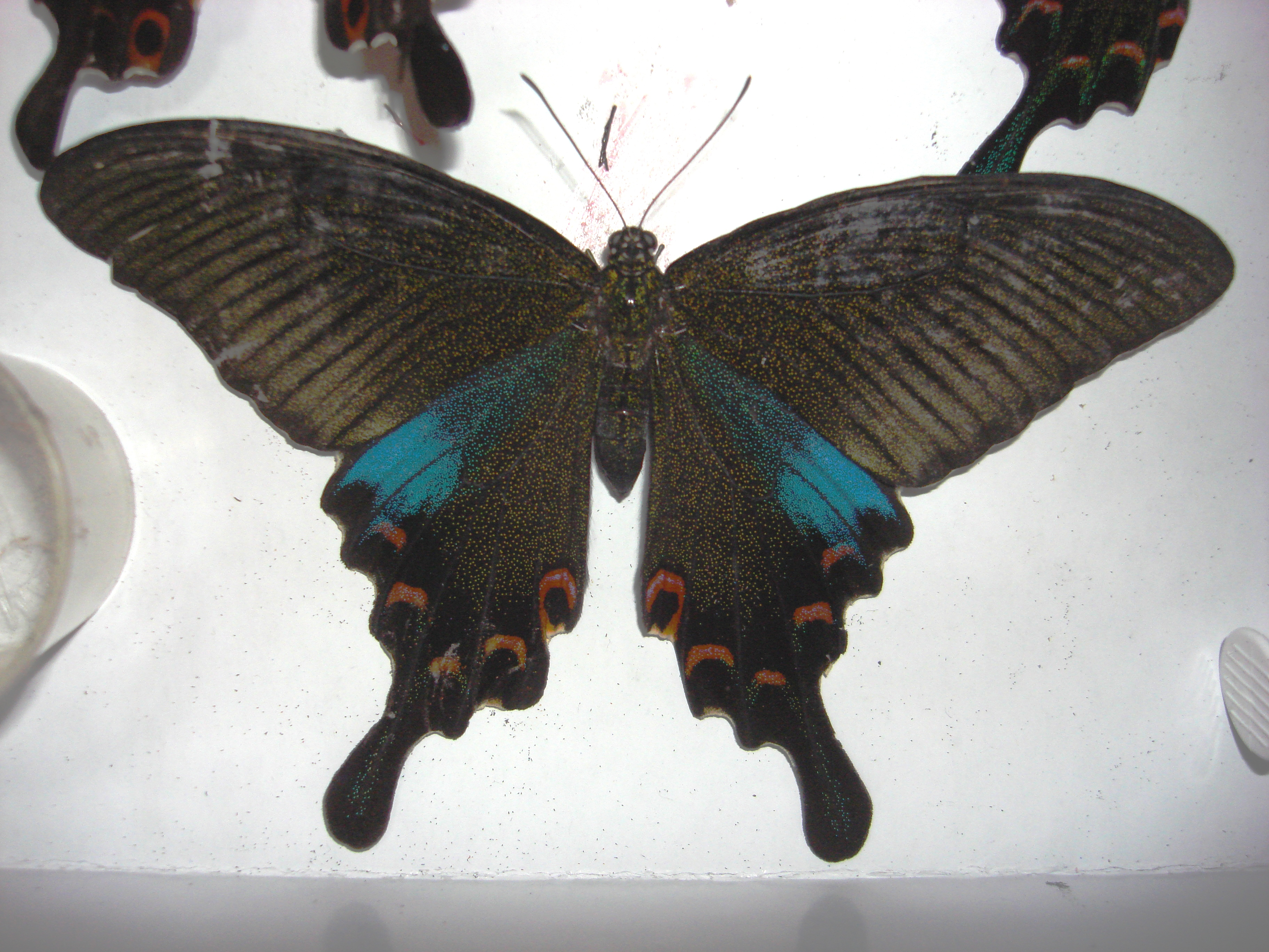 Egy nőstény Papilio polyctor Pekingben.